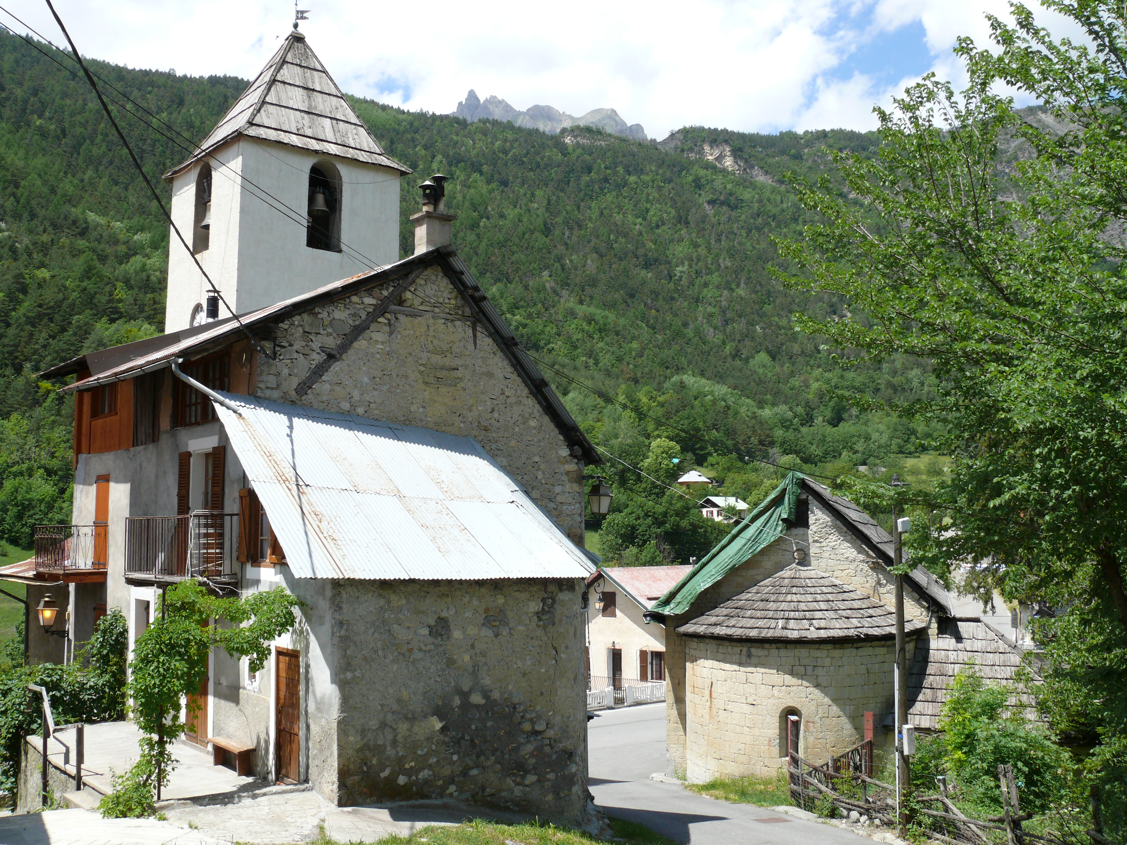 Saint-Martin-d'Entraunes - Eglise Saint-Martin et clocher